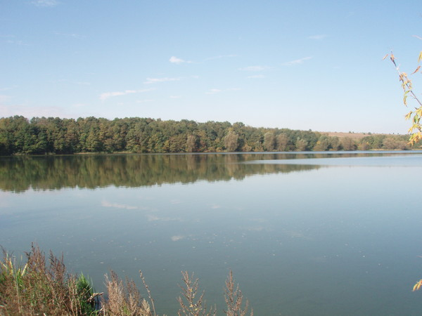 Башҡортса: Тарасовка ауылы (Винница өлкәһе, Украина)